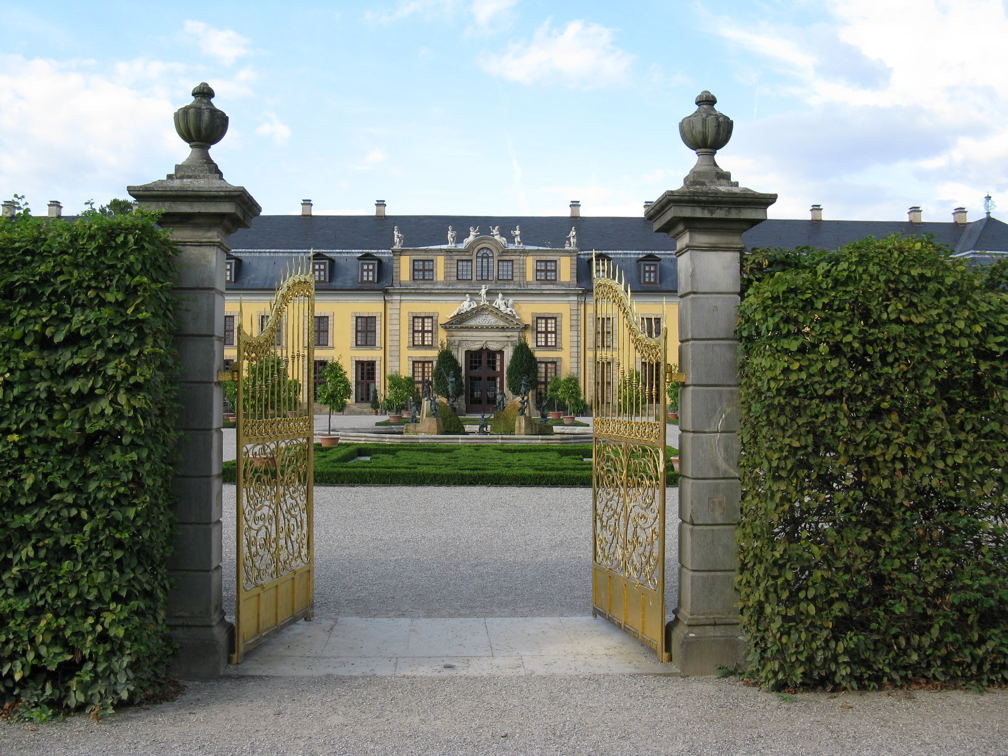 Großer Garten in Hannover-Herrenhausen: Goldenes Tor, dahinter Galeriegebäude